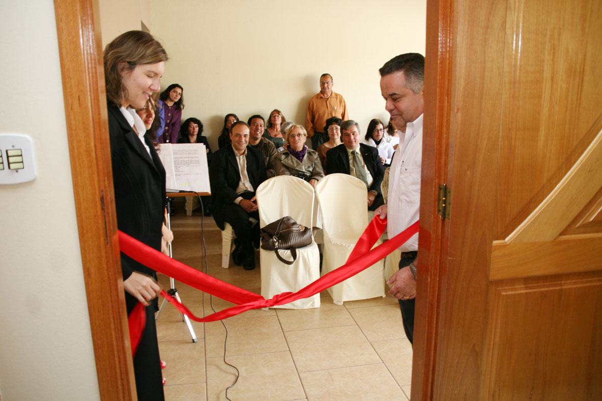 José Pavan Júnior (em primeiro plano), prefeito de Paulínia